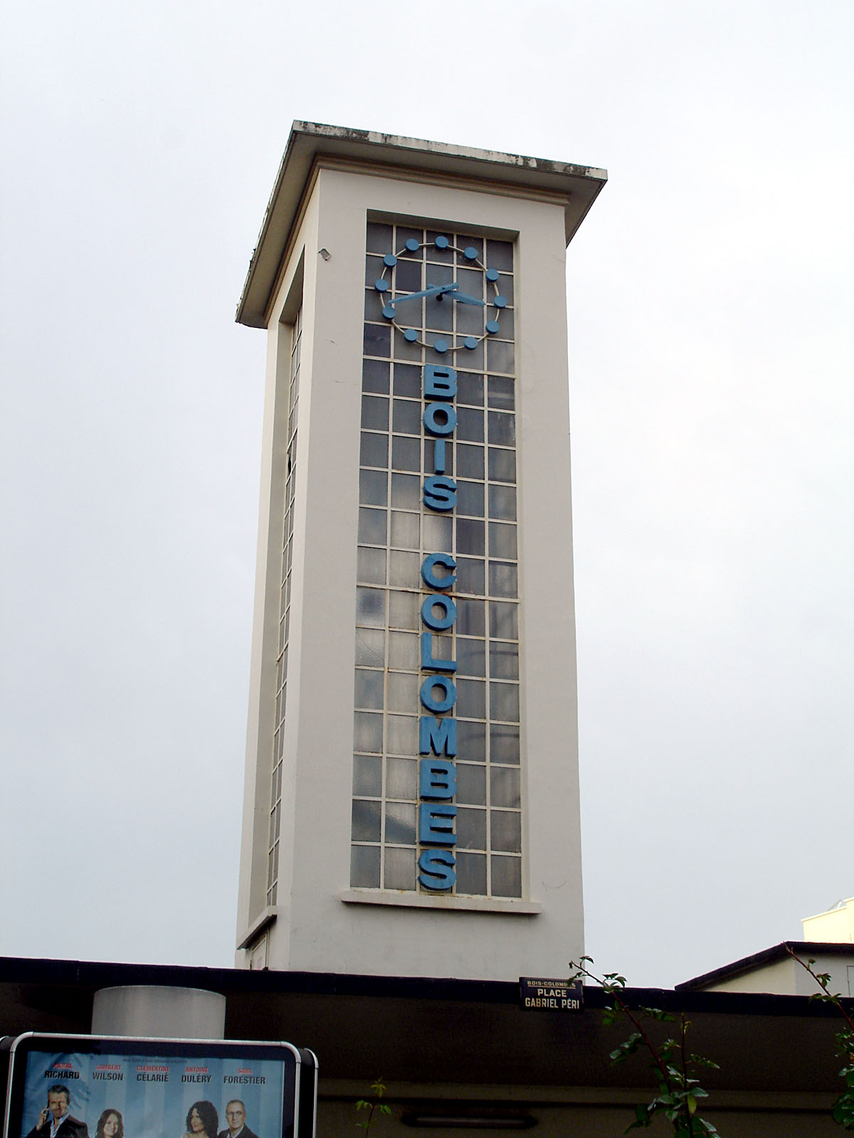 La gare de Bois-Colombes, Hauts-de-Seine, France.